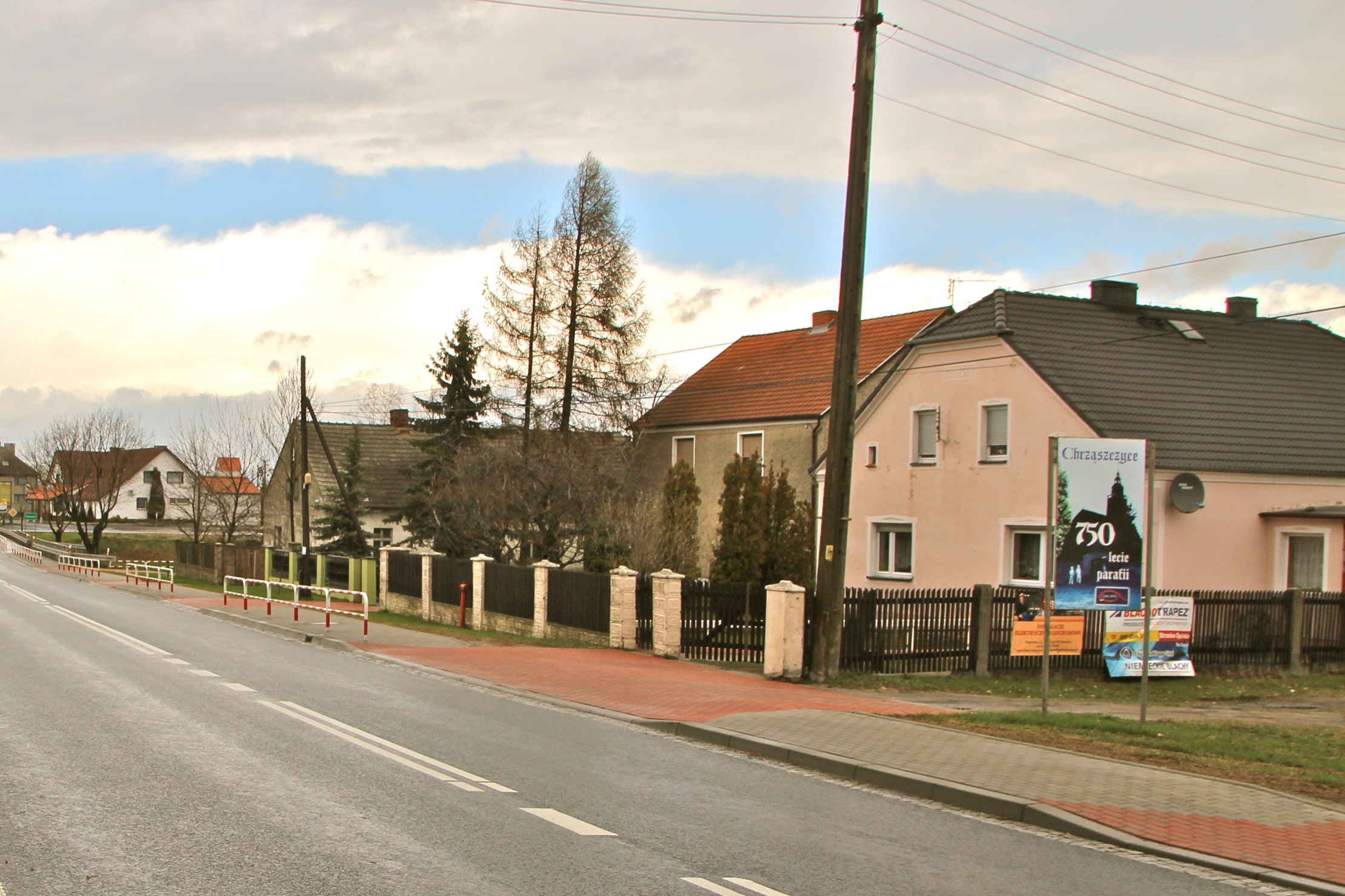 Droga krajowa nr 45 w Chrzowicach – (niem. Chrzowitz) wieś w Polsce położona w województwie opolskim, w powiecie opolskim, w gminie Prószków.